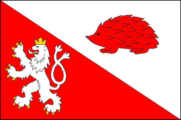 Prapor statutárního města Jihlavy